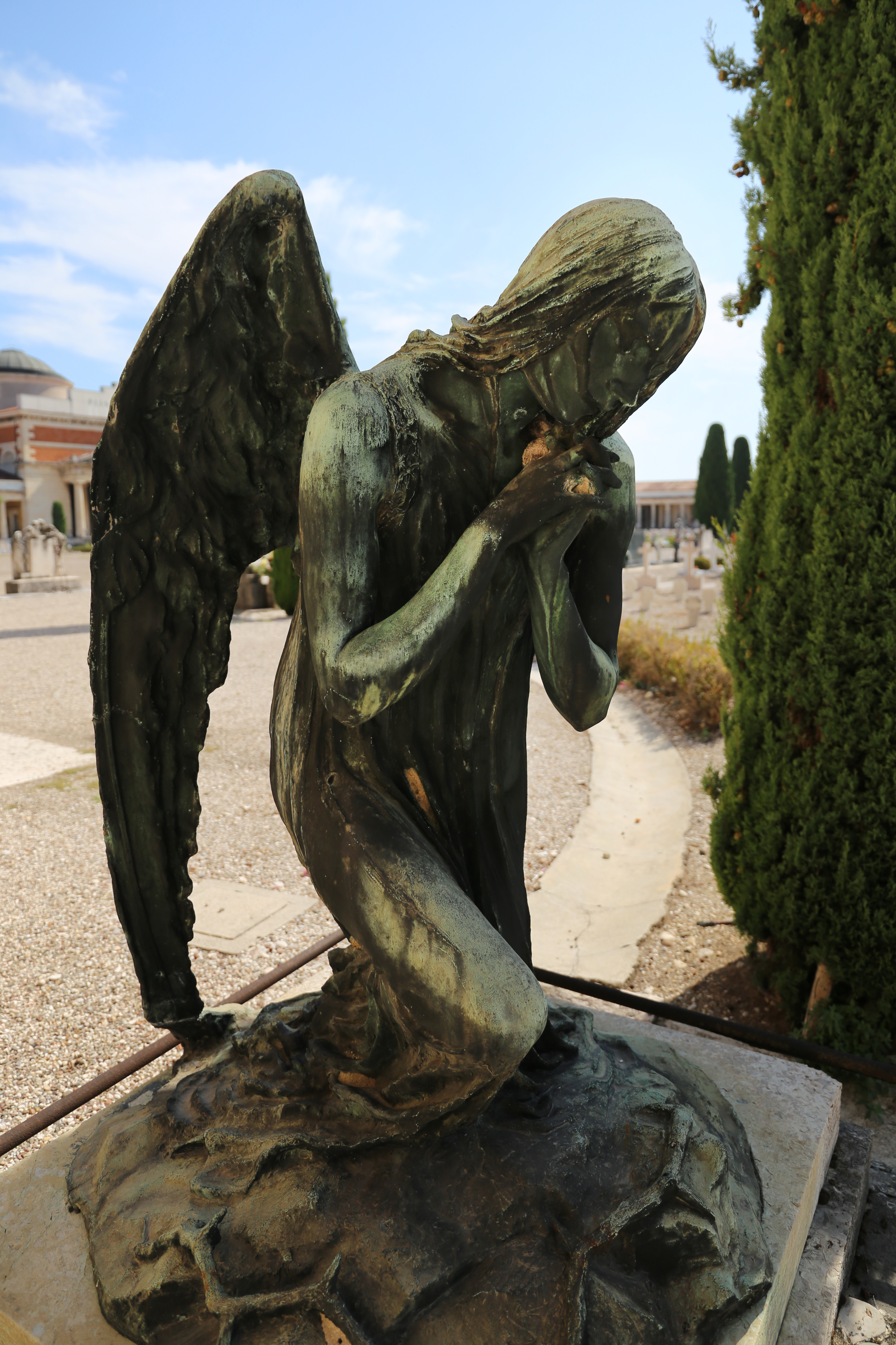 cimitero monumentale di Verona This is a photo of a monument which is part of cultural heritage of Italy.